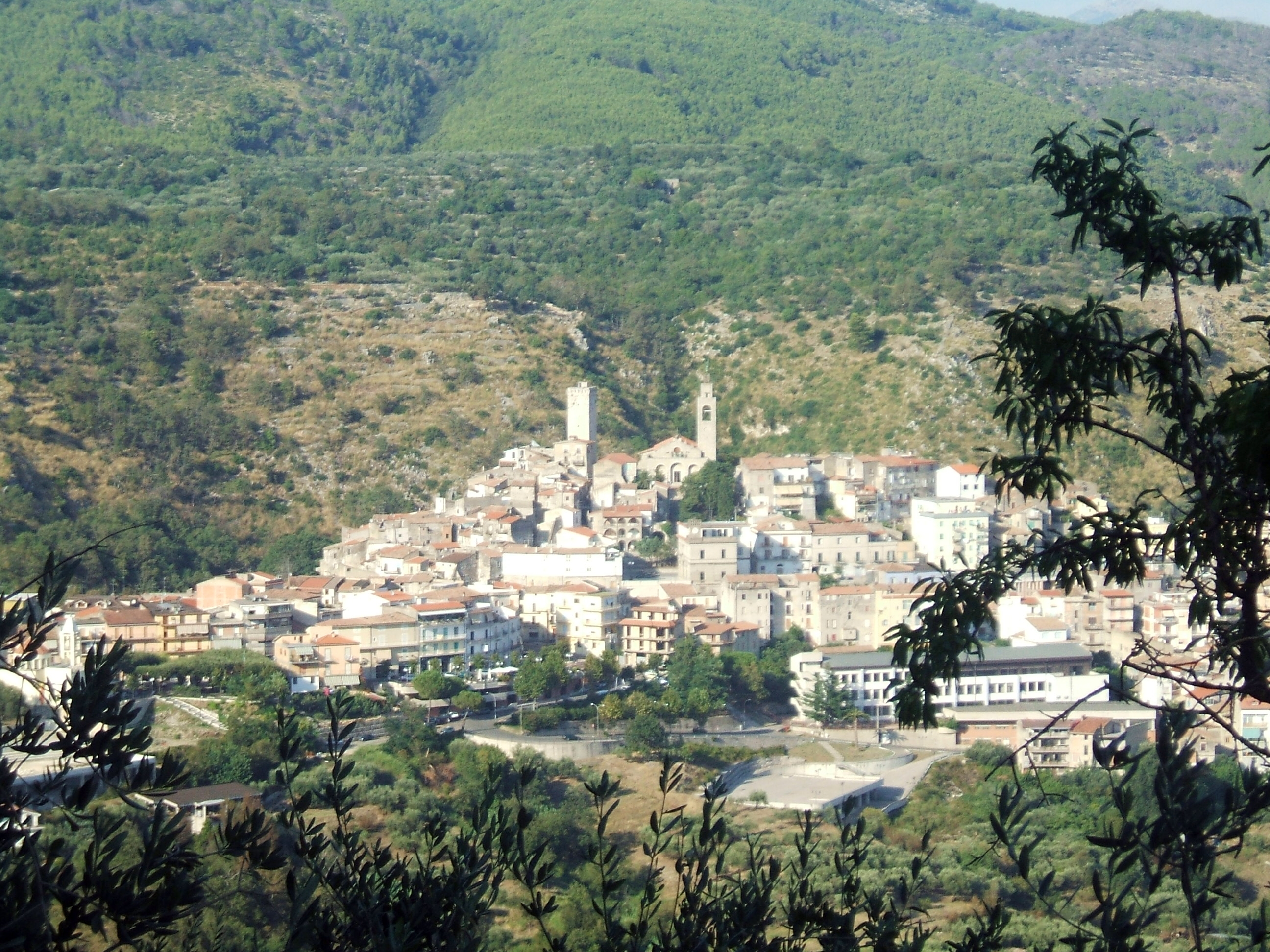 View of Castelforte (LT) town center, Provincia di Latina, Regione Lazio (Latina Province, Latium Region, Italy).